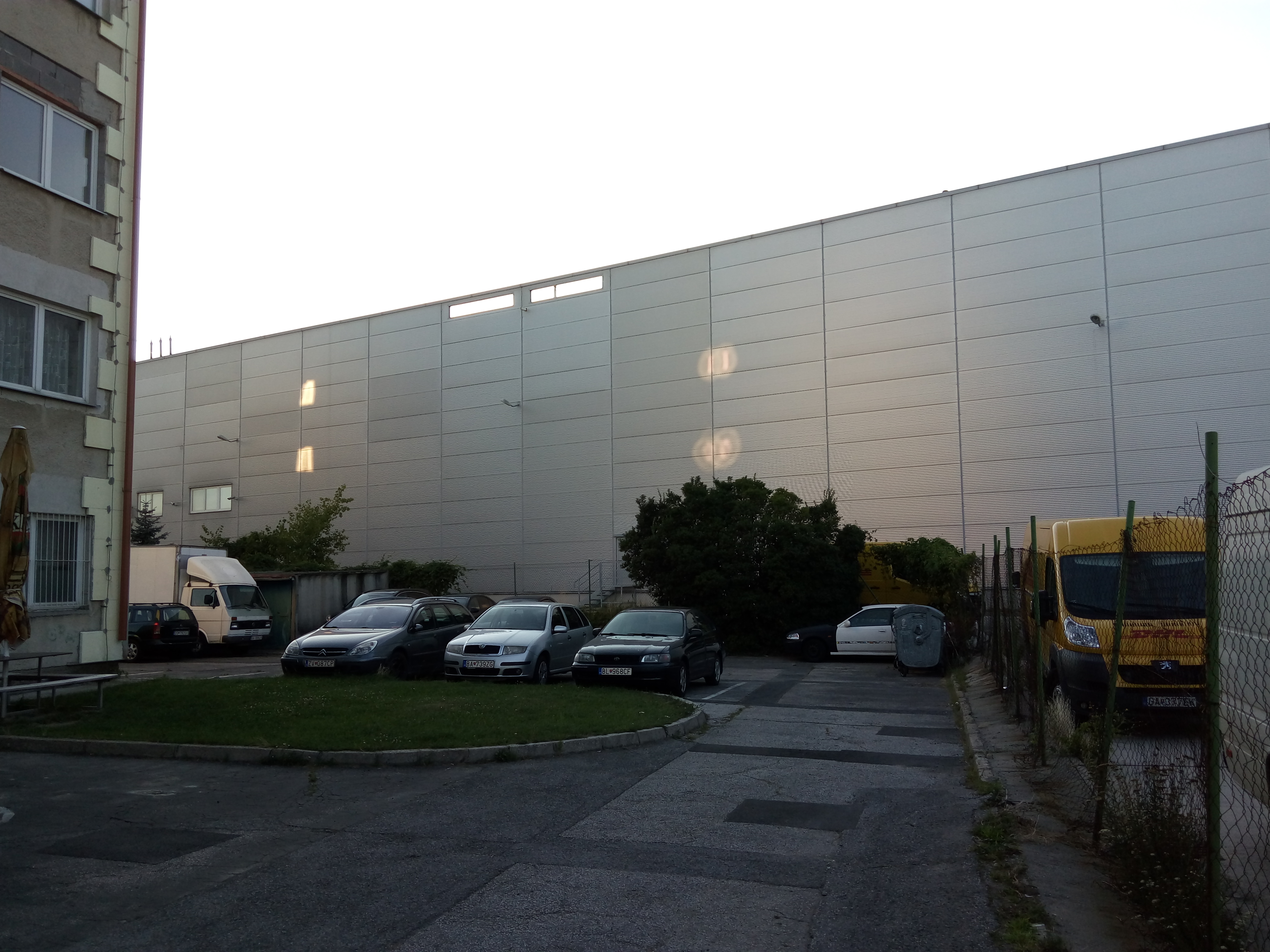 Na pántoch, Rača, Bratislava